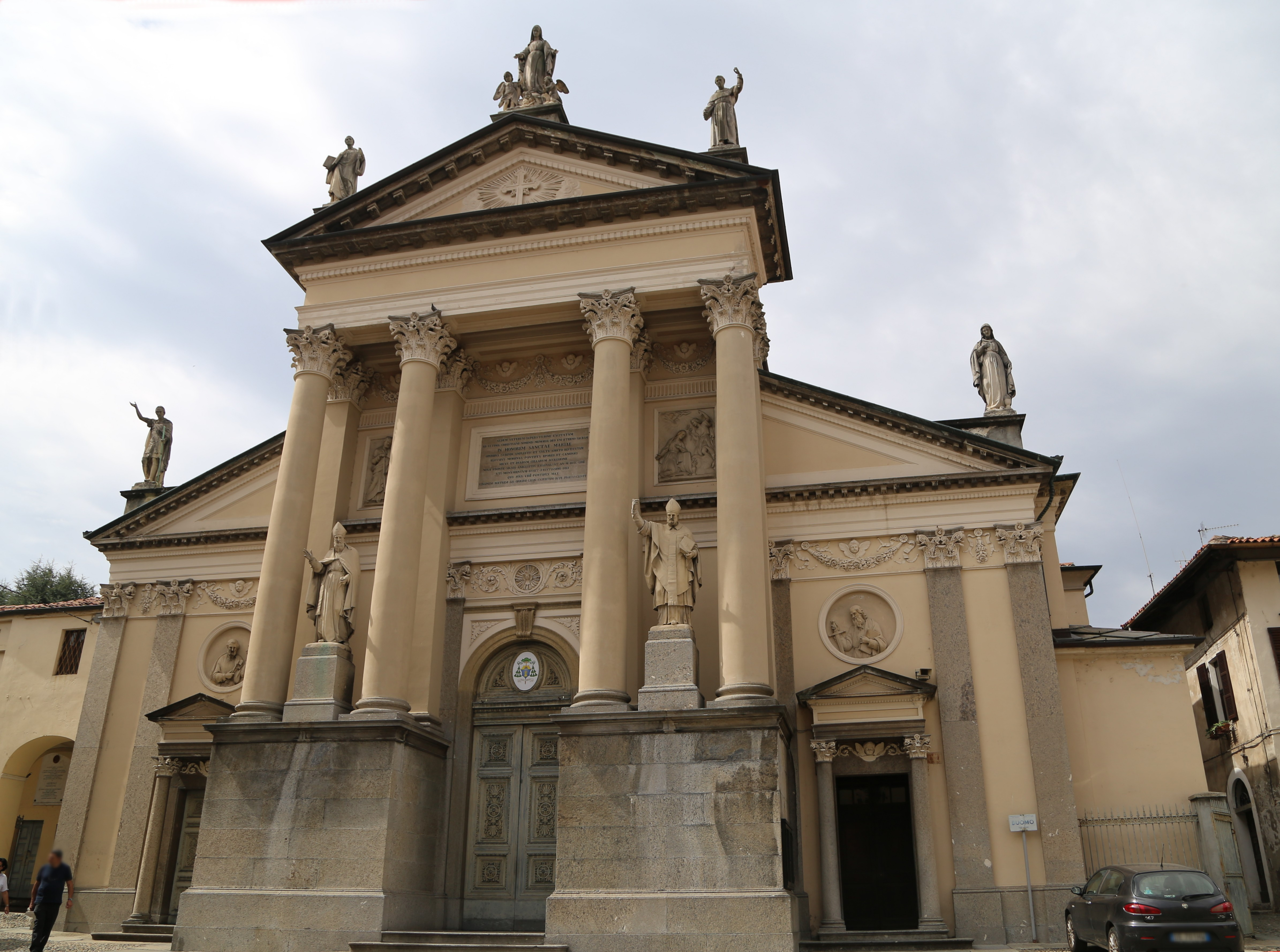 Duomo, Ivrea, Piemont